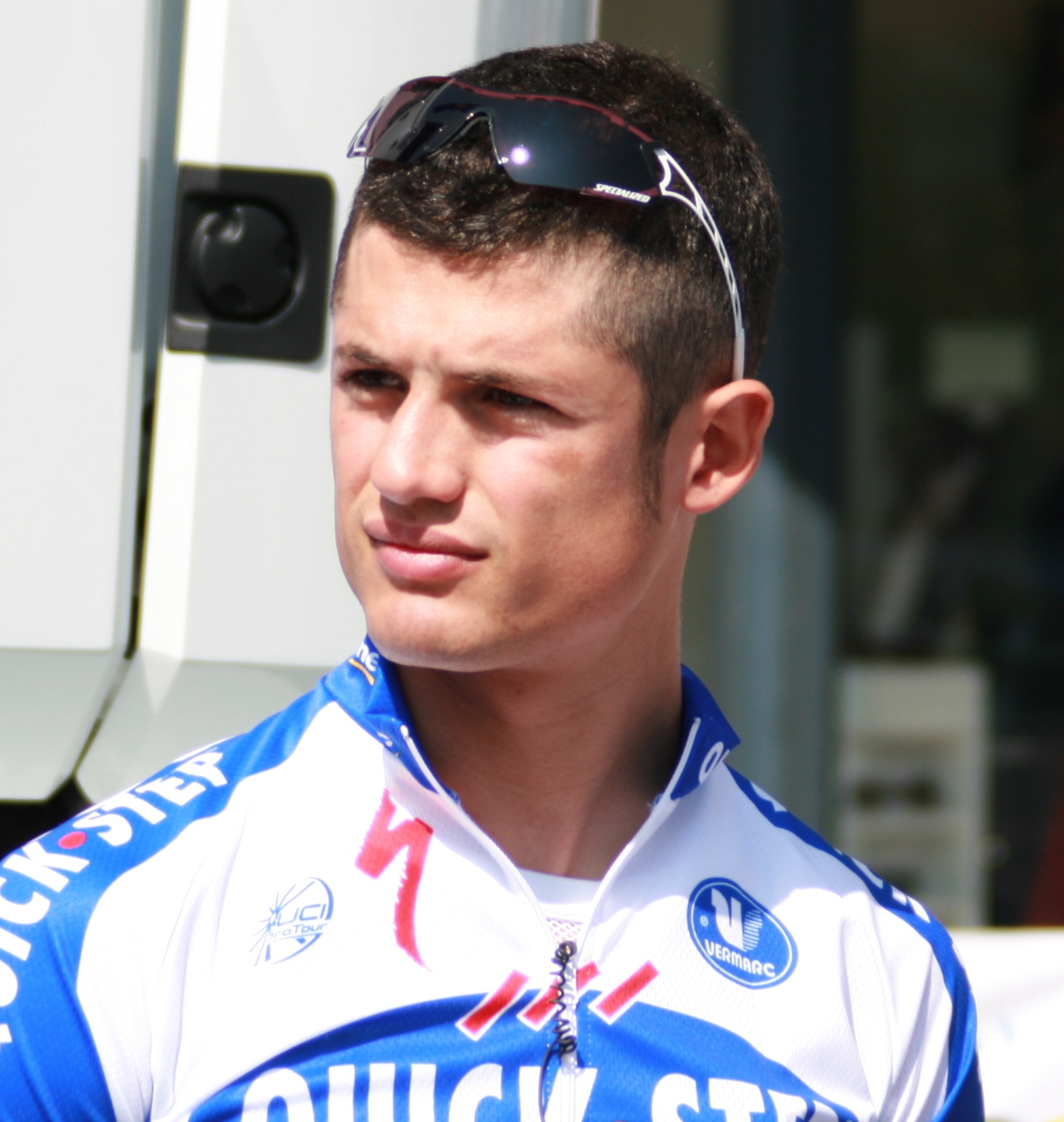 Davide Vigano aux Quatre jours de Dunkerque 2008